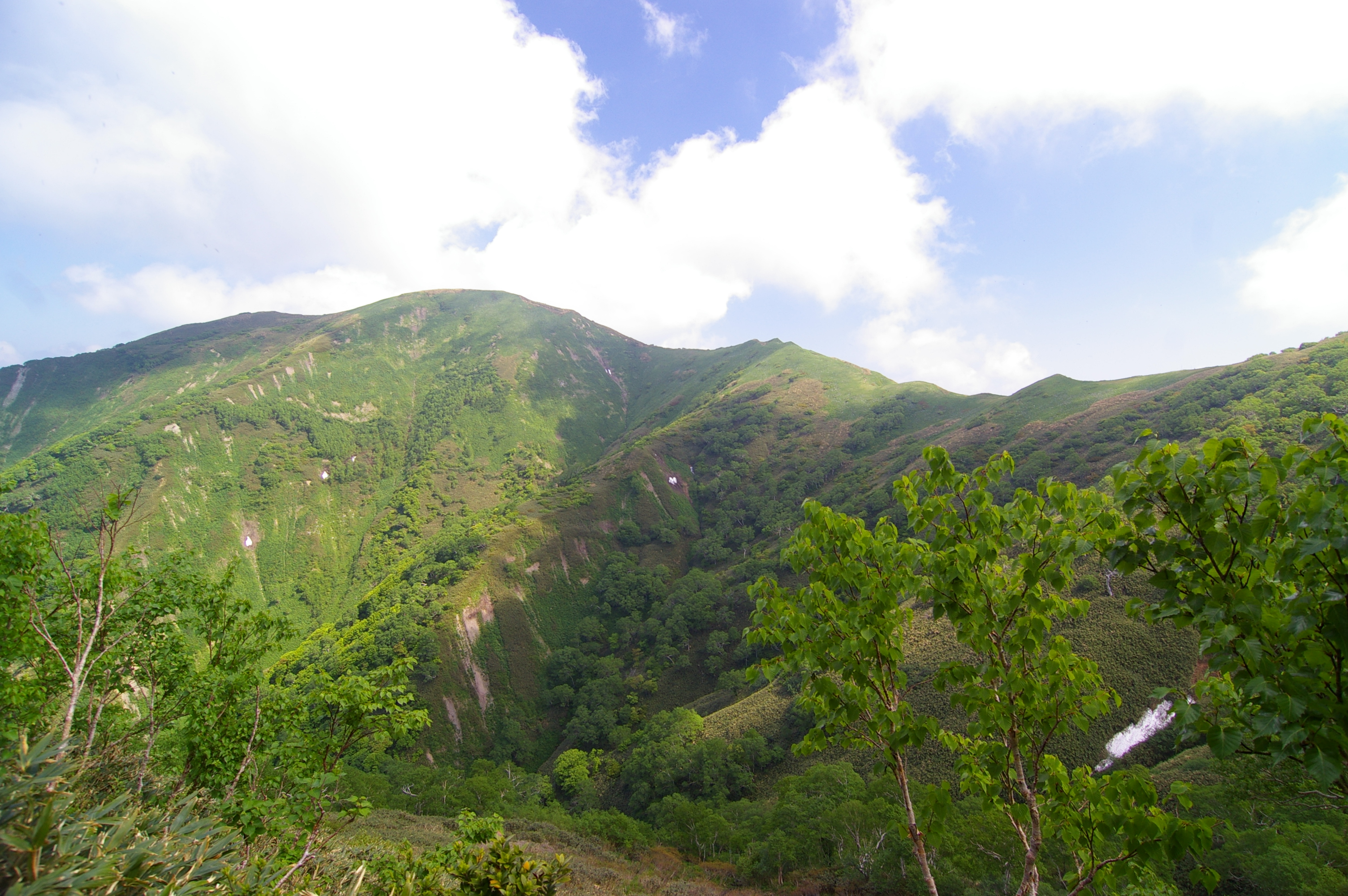 西から望む大千軒岳。旧道コース尾根から撮影。